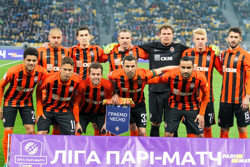 Динамо - Шахтер 0:1